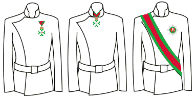 Modo di indossare le decorazioni dell'Ordine Reale di Santo Stefano d'Ungheria (Impero Austriaco)